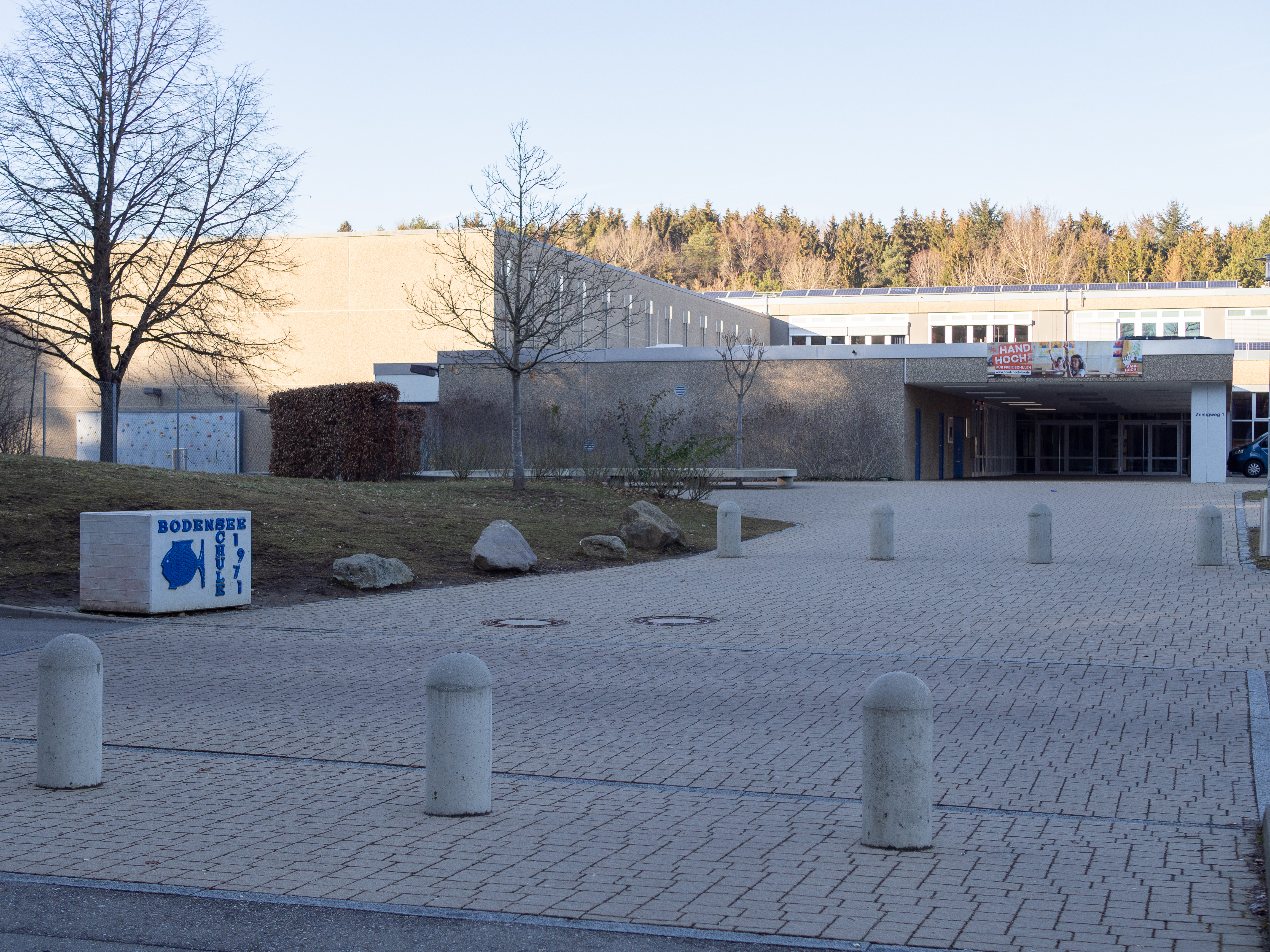 Bodensee-Schule St. Martin